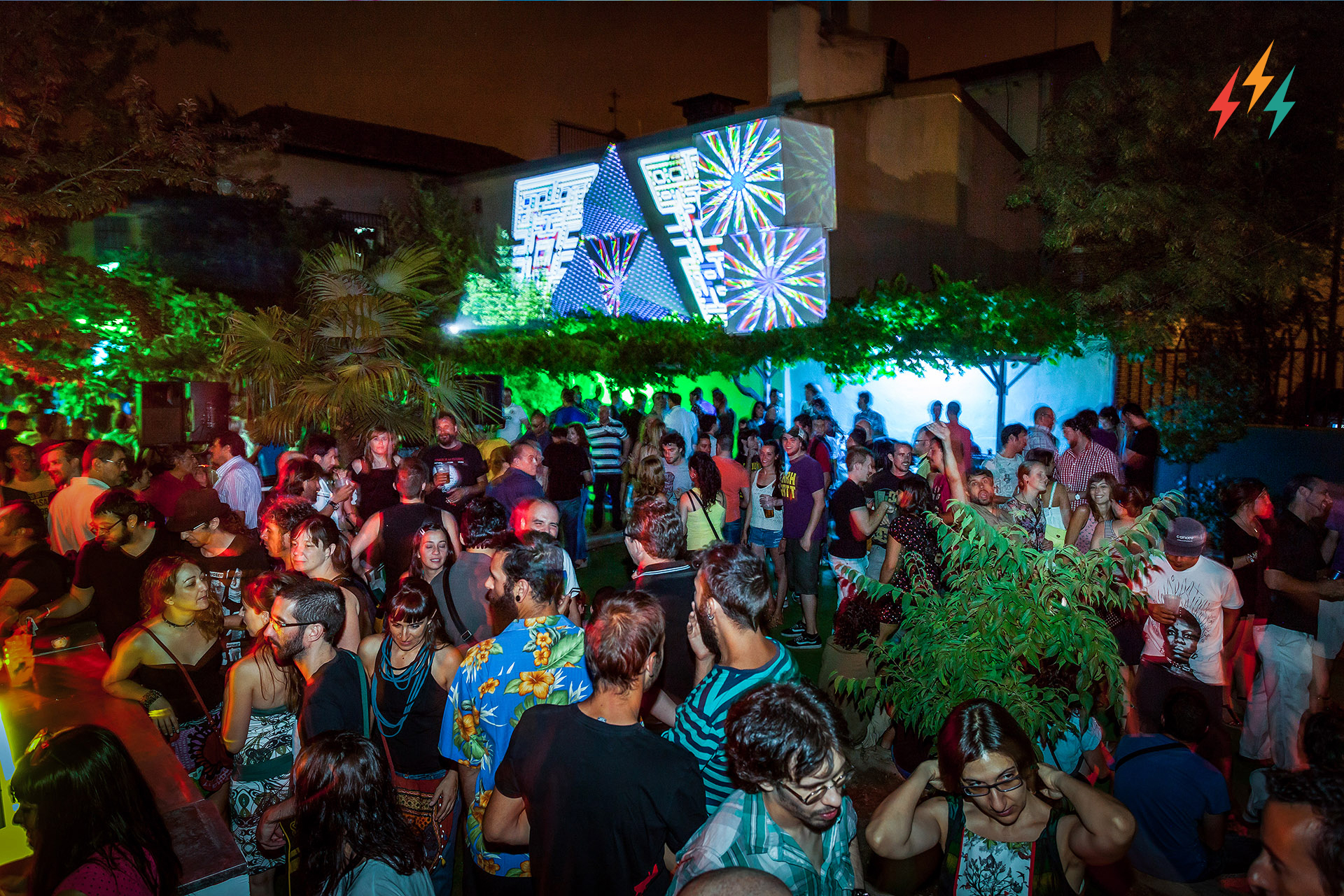 Edición de 2011 del Festival Cultura Inquieta